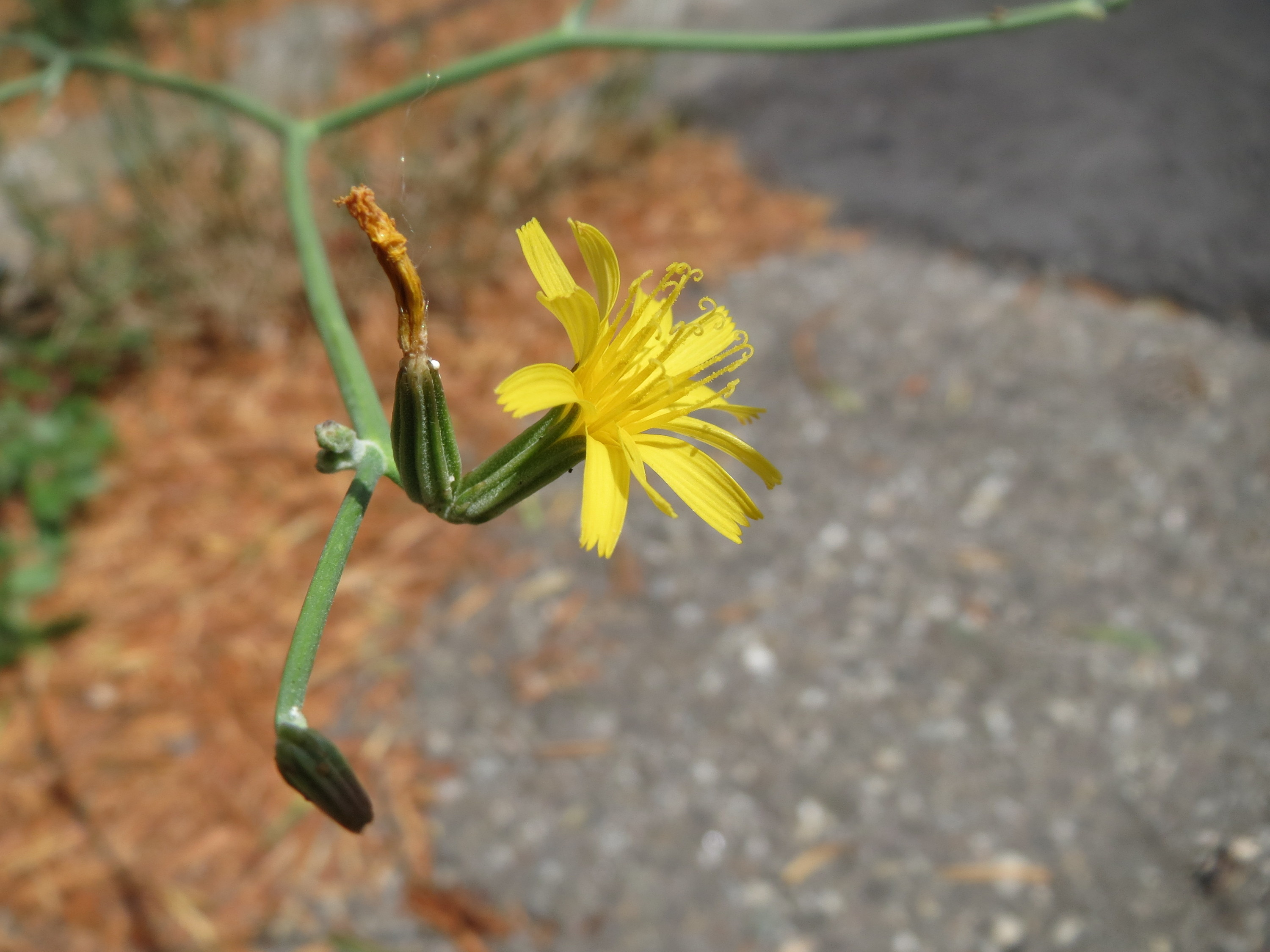 Ritzenbotanik: Großer Knorpellattich (Chondrilla juncea) in Hockenheim